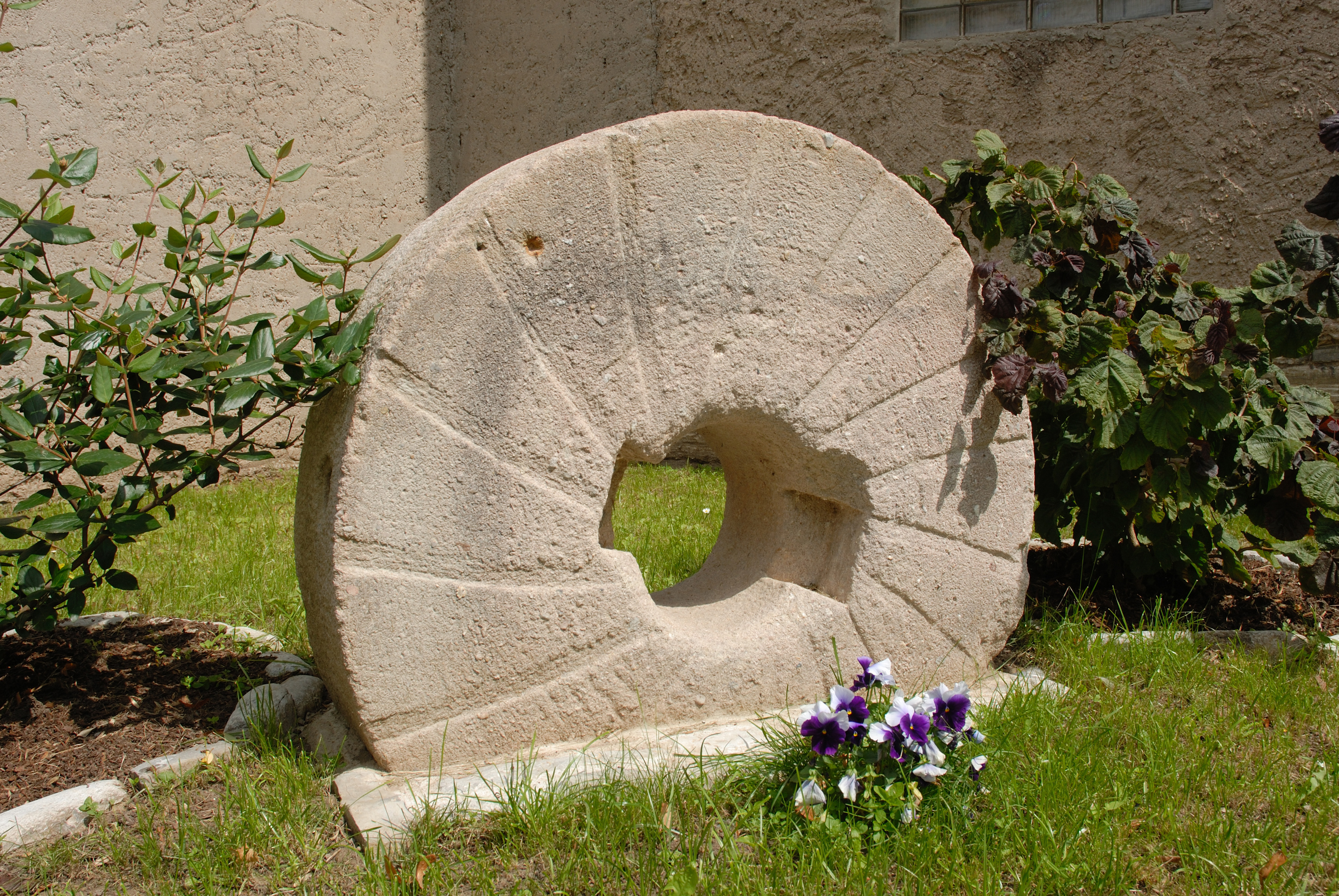 Im Bachort Andisleben ist man auf diesen historischen Mühlstein besonders stolz. Er steht ganz in der Nähe der Kirche.